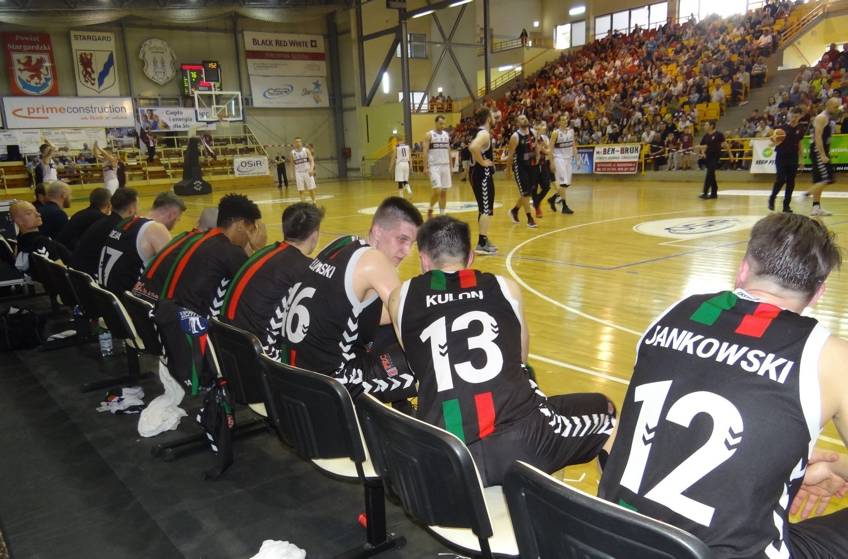 GKS Tychy podczas meczu ze Spójnią Stargard